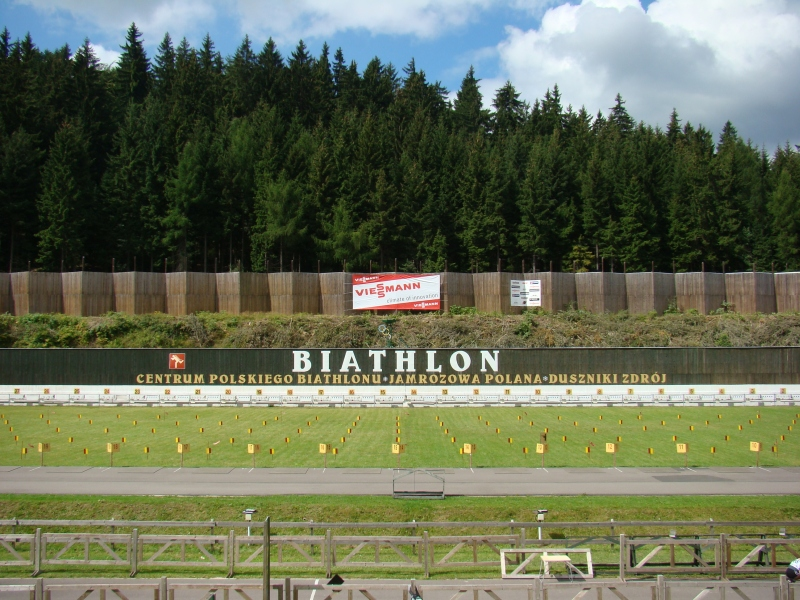 Centrum Polskiego Biathlonu Jamrozowa Polana